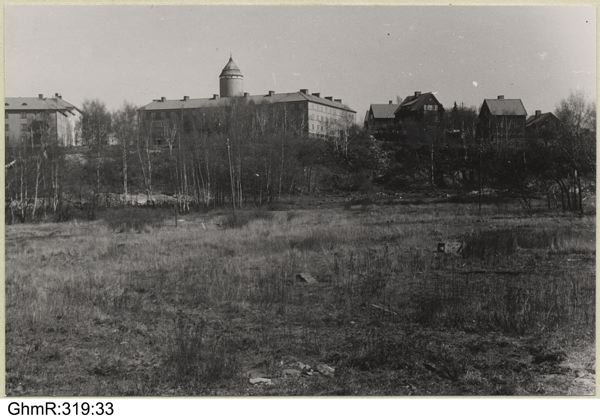 Fastigheter vid Egnahemsvägen samt vattentornet, vy tagen västerifrån där Guldhedsholm nu ligger. Landala Egnahem i stadsdelen Landala i Göteborg.